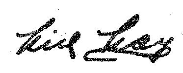 Autogramm von Mia May